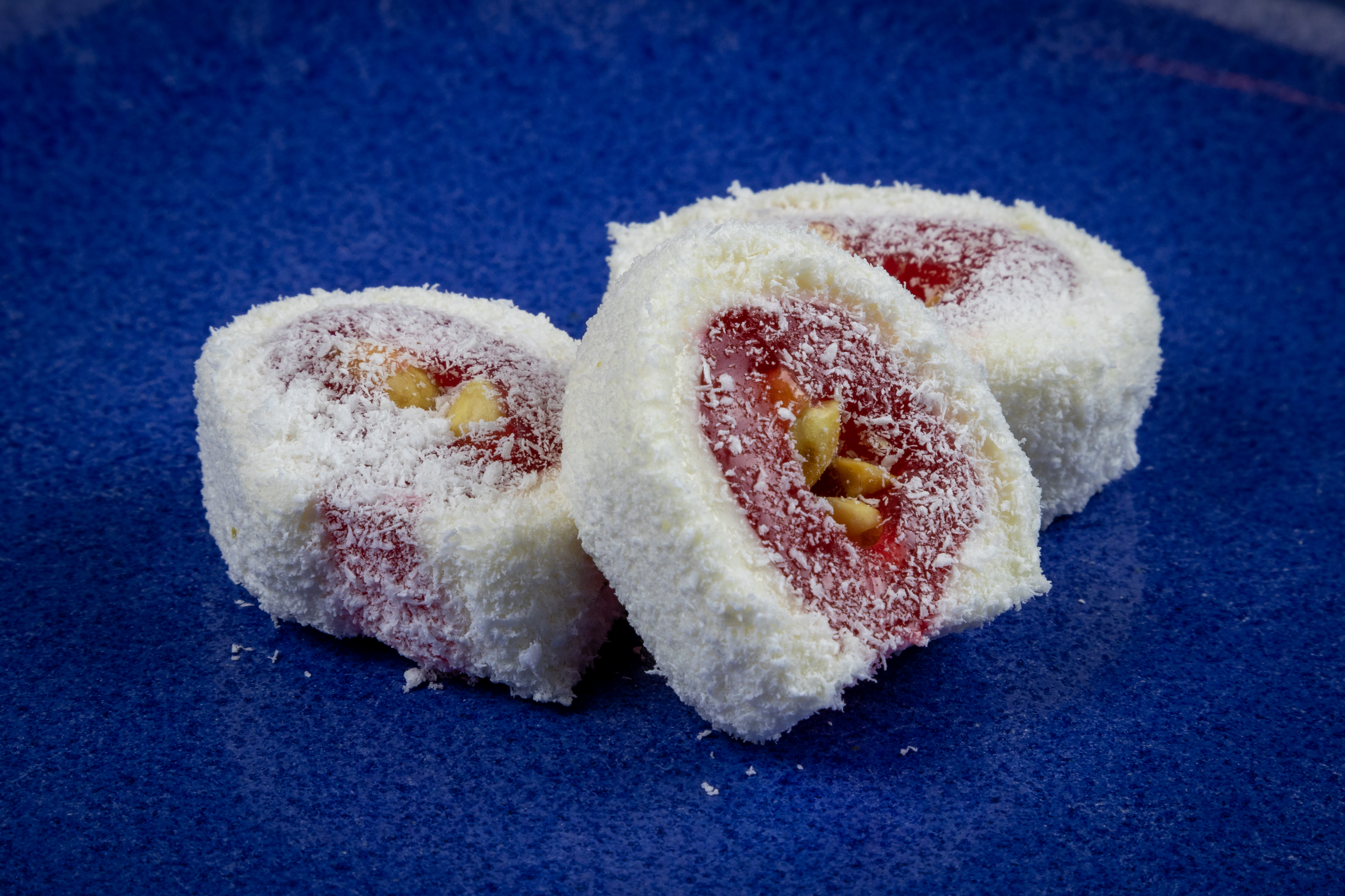 Lokum (türkische Süßigkeit) mit Pistazien und Kokosraspel